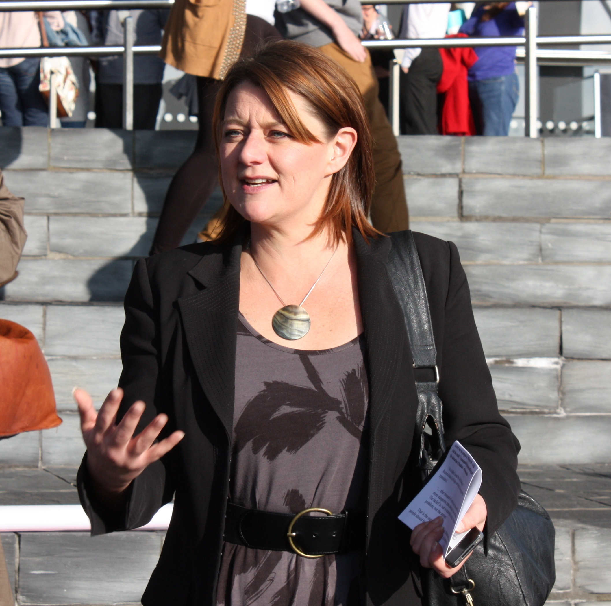 More information on the National Assembly’s Petitions system: Am fwy o wybodaeth ar system deisebau Cynulliad Cenedlaethol Cymru